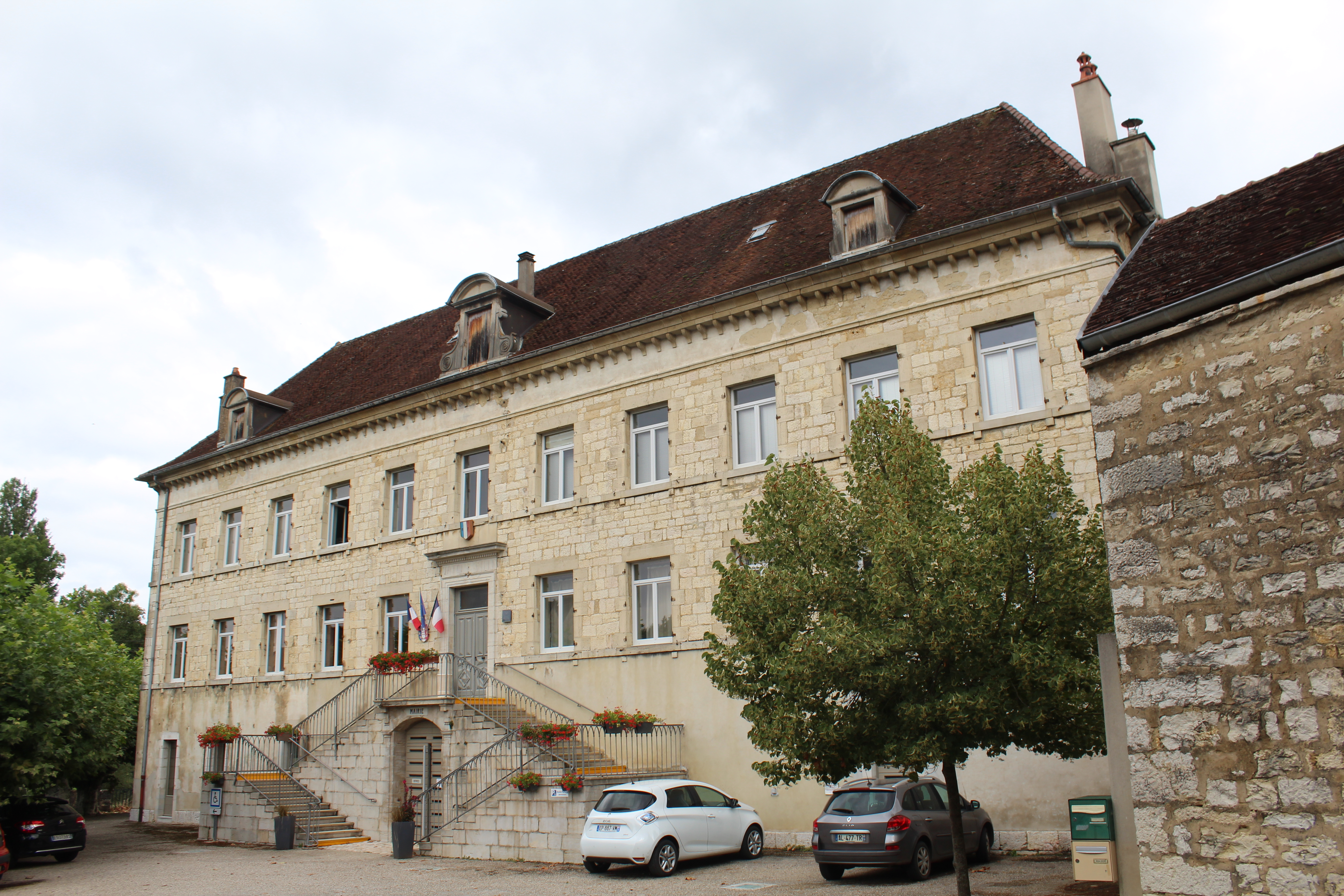 Mairie de Sellières.